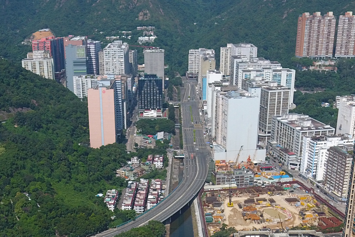 Fo Tan Industrial Buildings